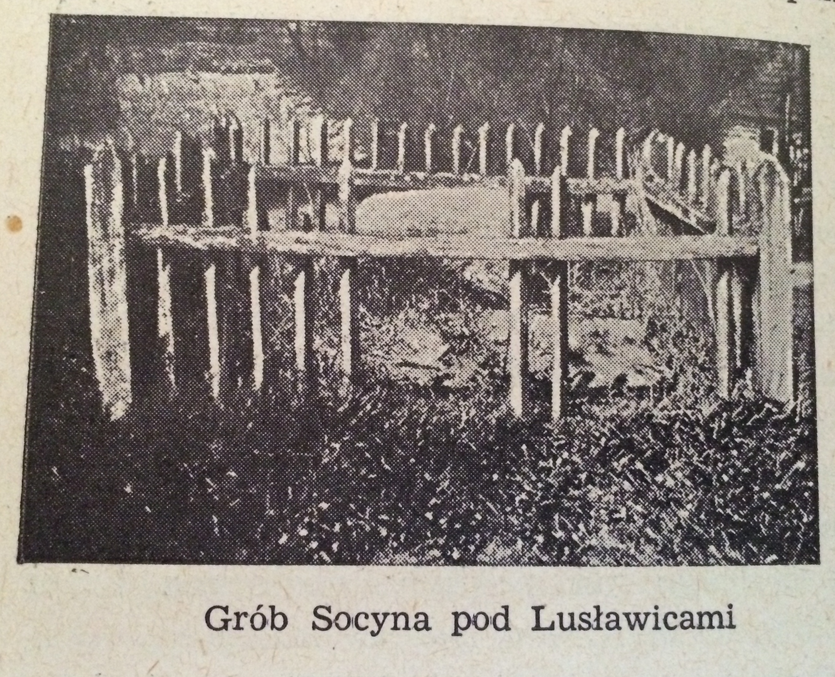 Photo of Faustus Socinius' grave printed in the work: Z. Ogonowski, Arianie polscy, Warszawa 1952 p. 100